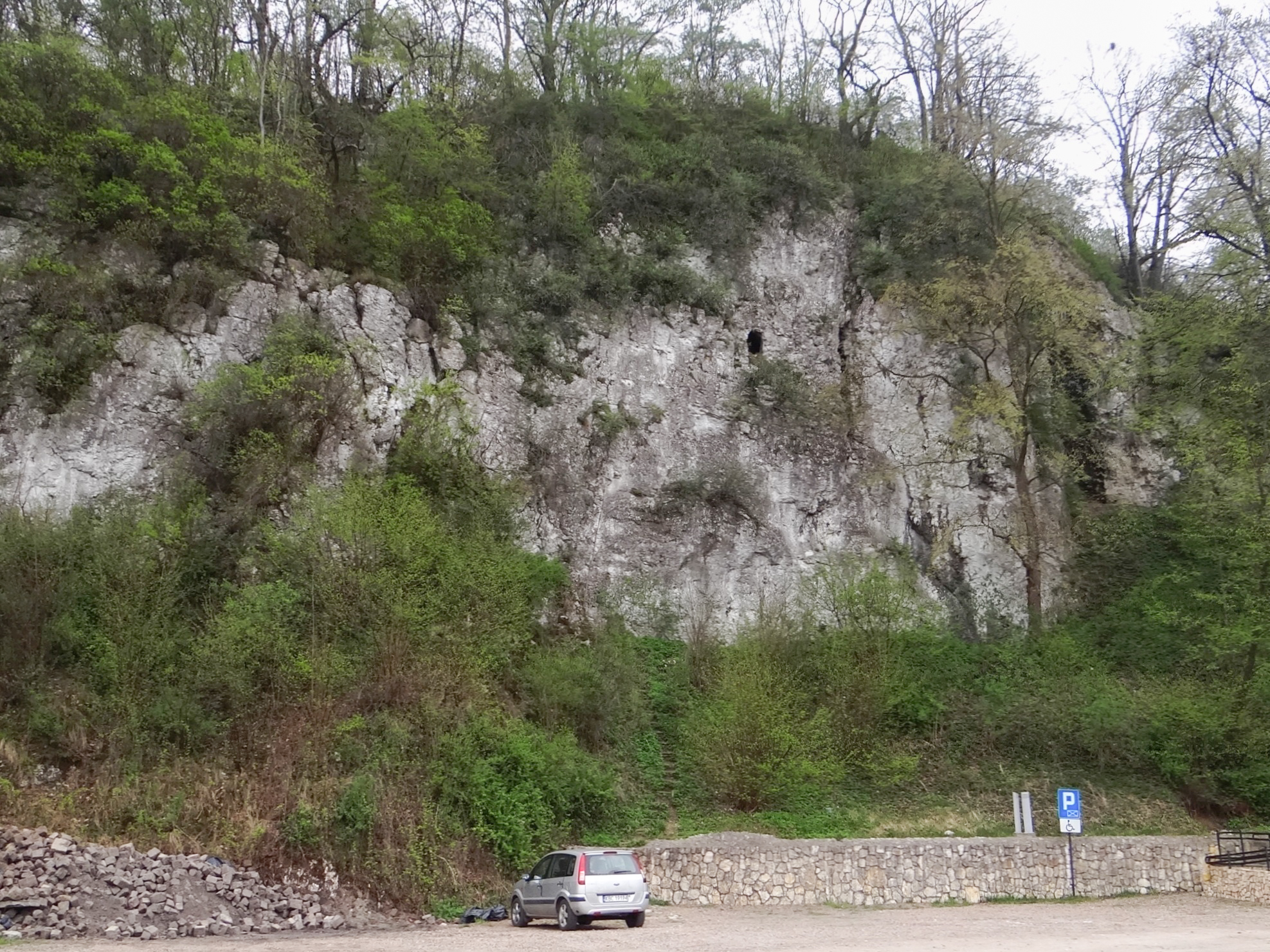 Mur przy Skurwysynie w Tyńcu nad Wisłą